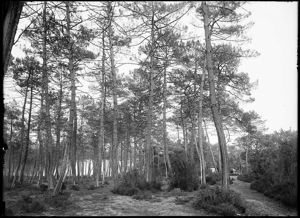 Reproduction numérique de la photographie de Félix Arnaudin réalisé le 3 octobre 1898 sur plaque de verre (13*18cm) présentant la pinède landaise